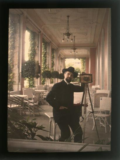 Autoportrait du photographe Léon Gimpel